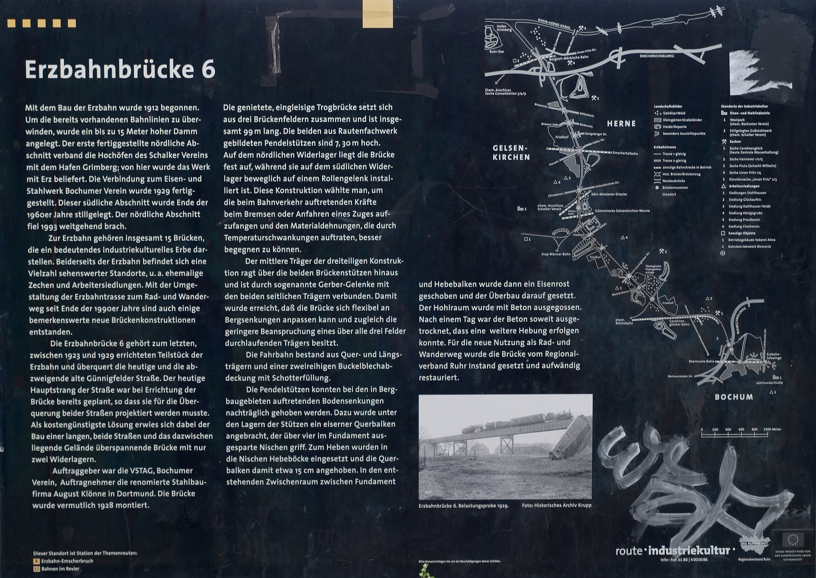 Infotafel an der ehemaligen Erzbahn in Bochum